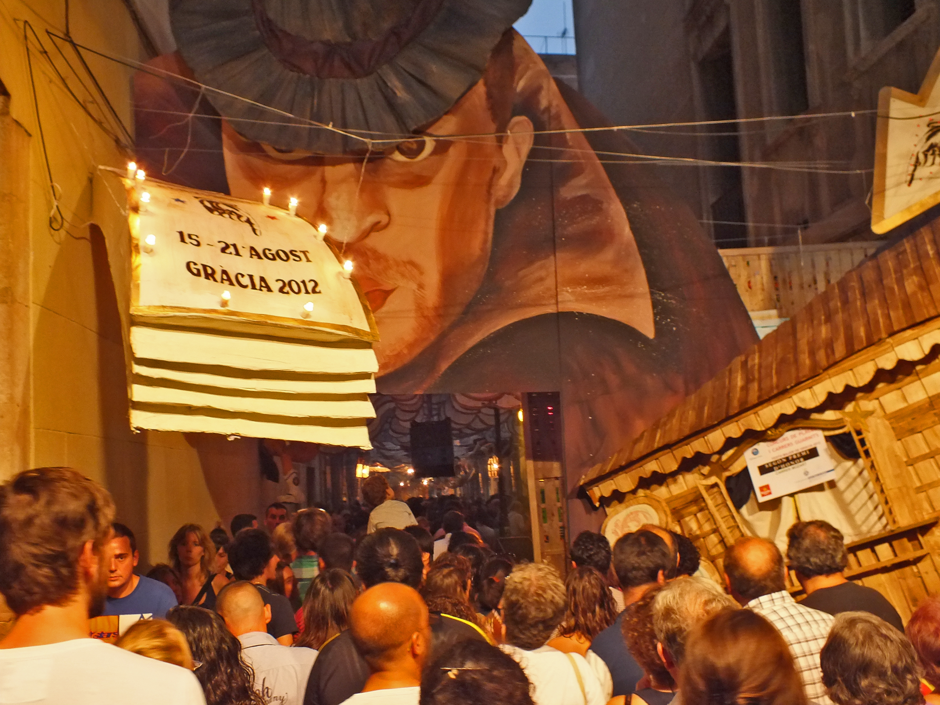 Fiestas Barrio de Gracia